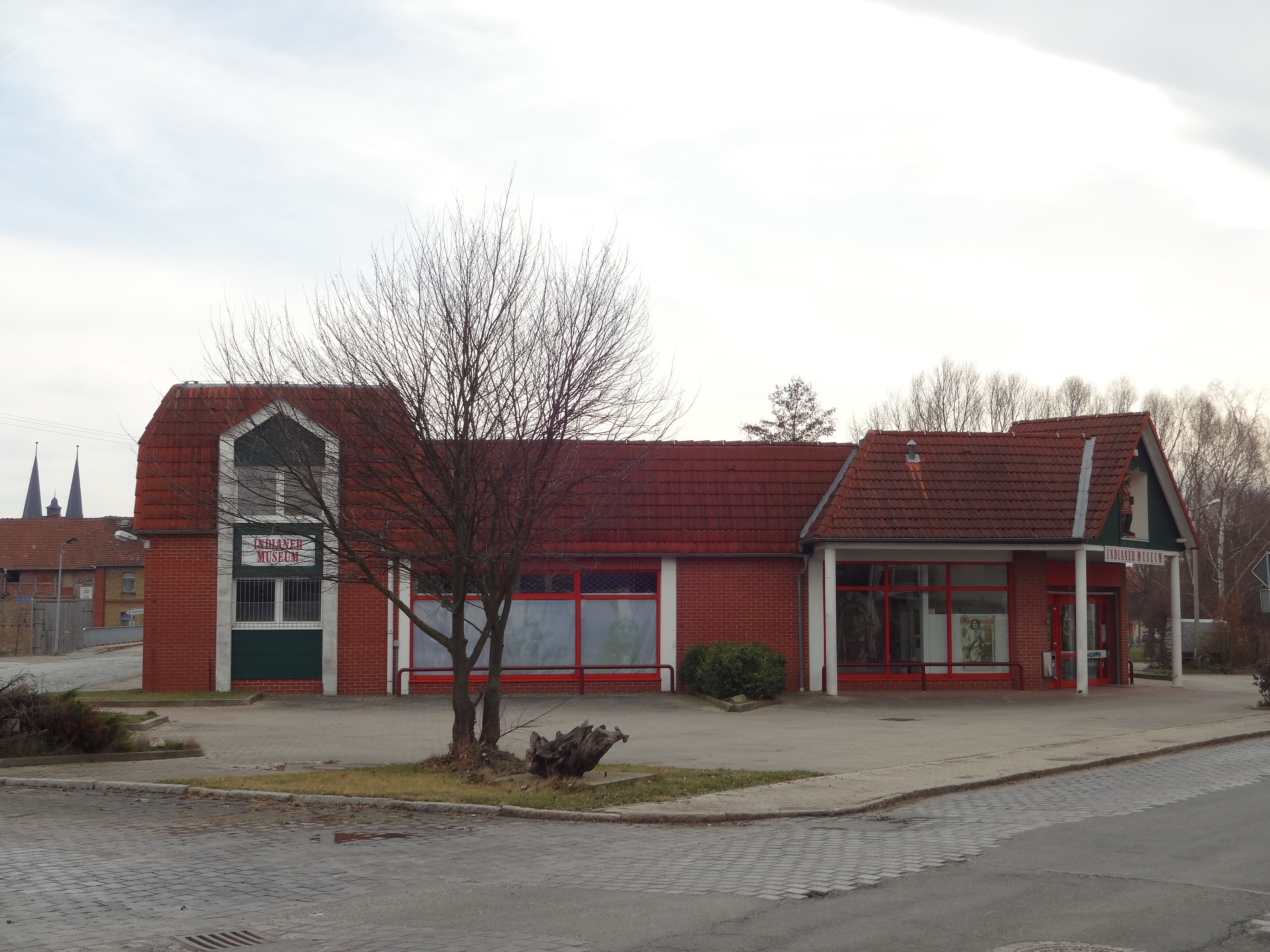 Indianermuseum in Derenburg Ecke Bleichstraße/Kornstraße, Ortsteil von Blankenburg (Harz)